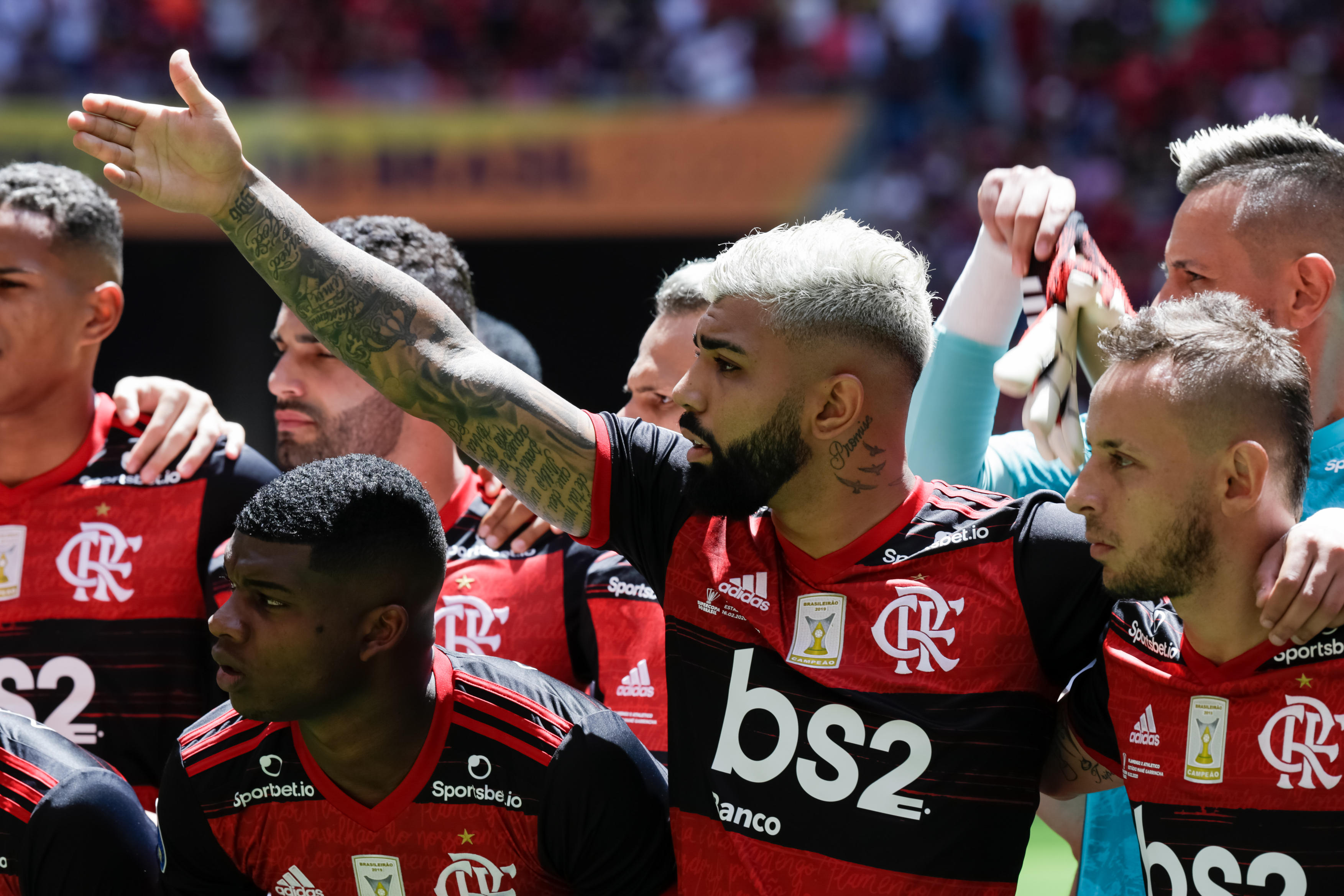 (Brasília - DF, 16/02/2020) Jogo Flamengo x Atlético PR. Foto: Carolina Antunes/PR